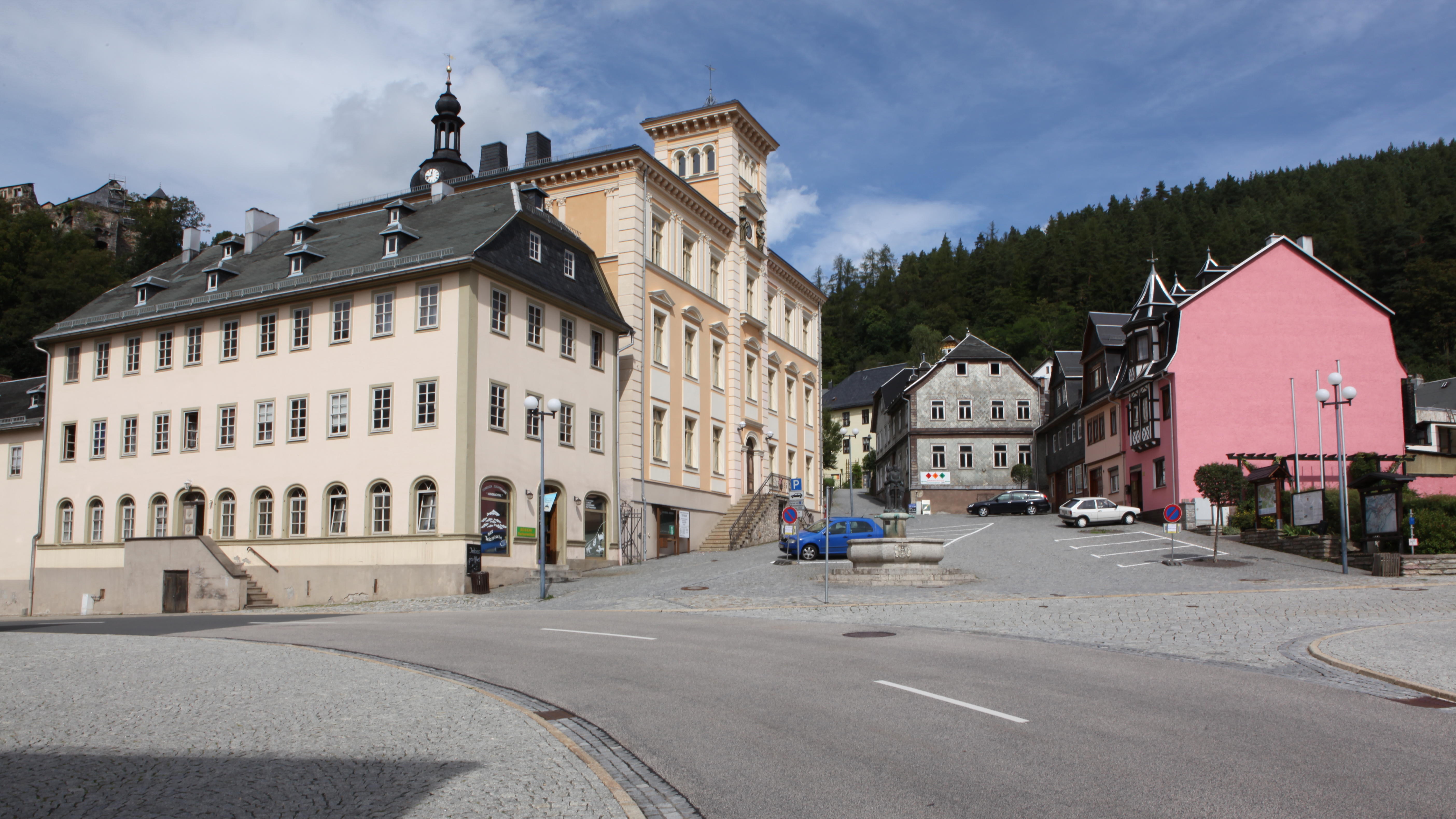 Gräfenthal Marktplatz